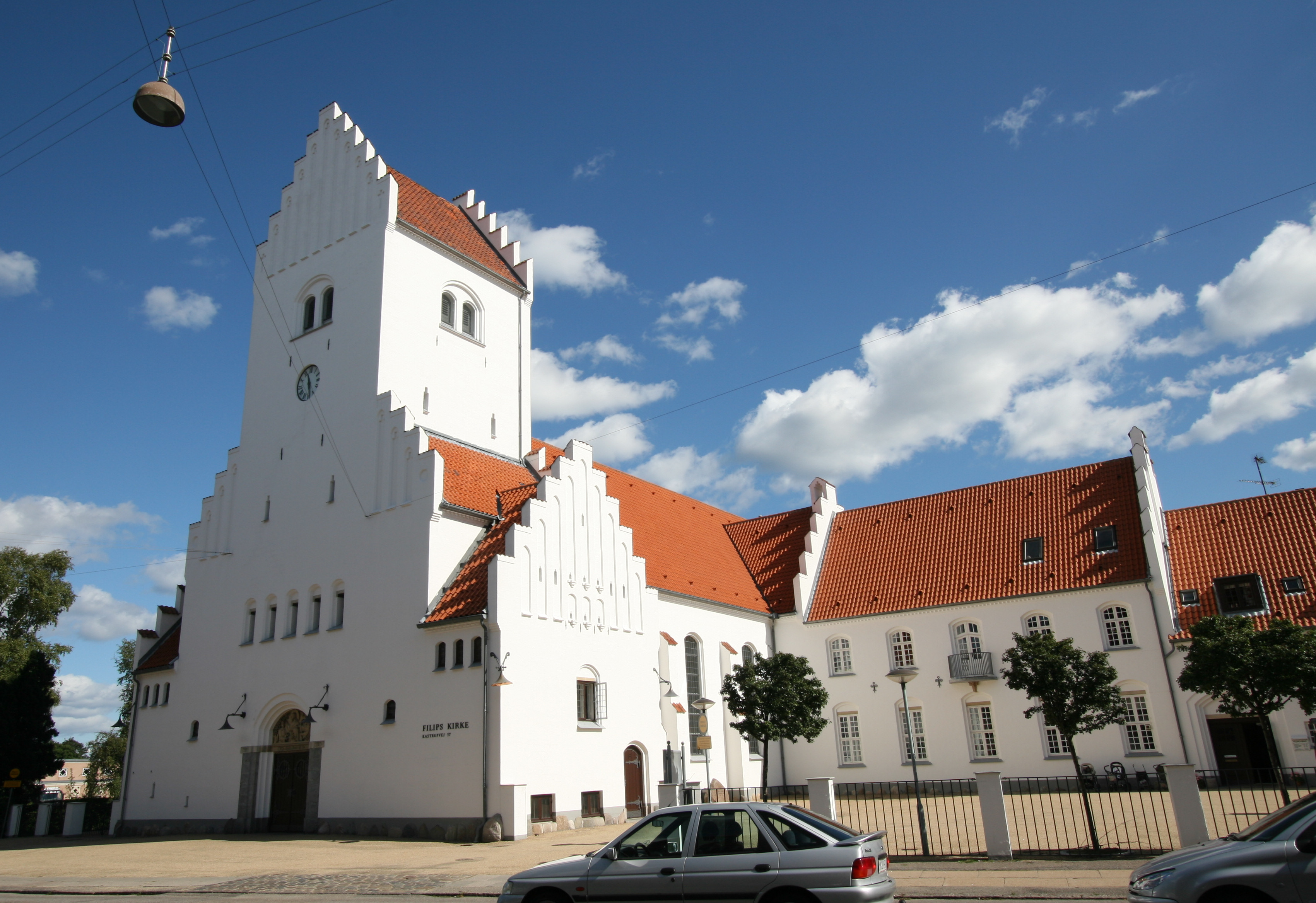 Filips Kirke, Amager, Copenhagen, Denmark. Filips Church